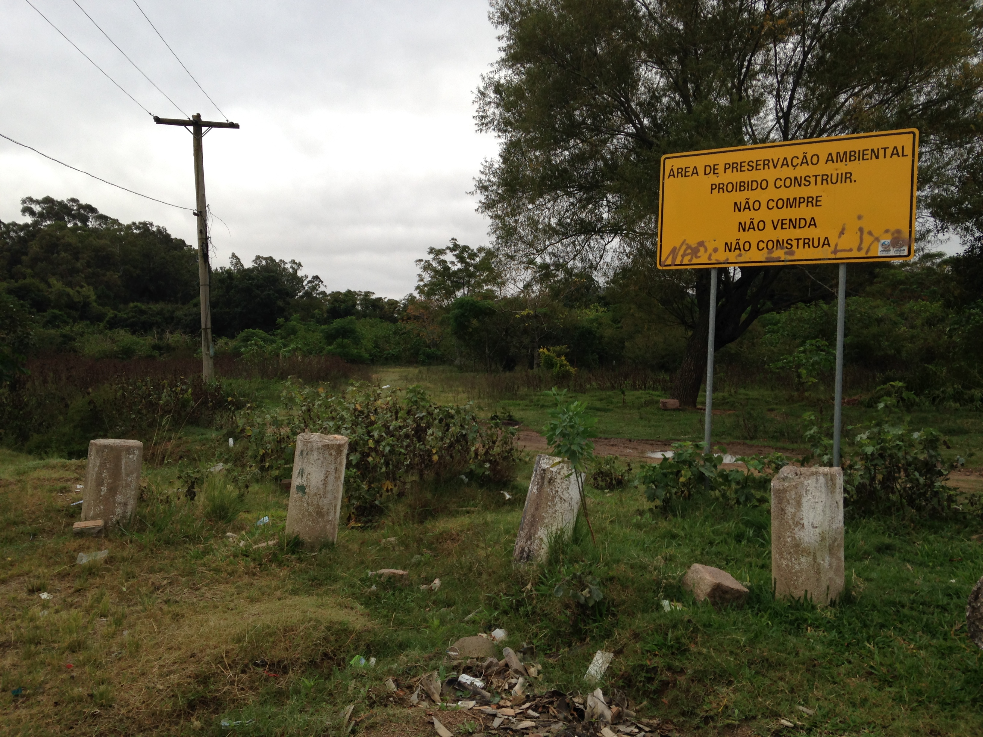 Final do loteamento "Túnel Verde", no Bairro Ponta Grossa, próximo das margens do Arroio do Salso.